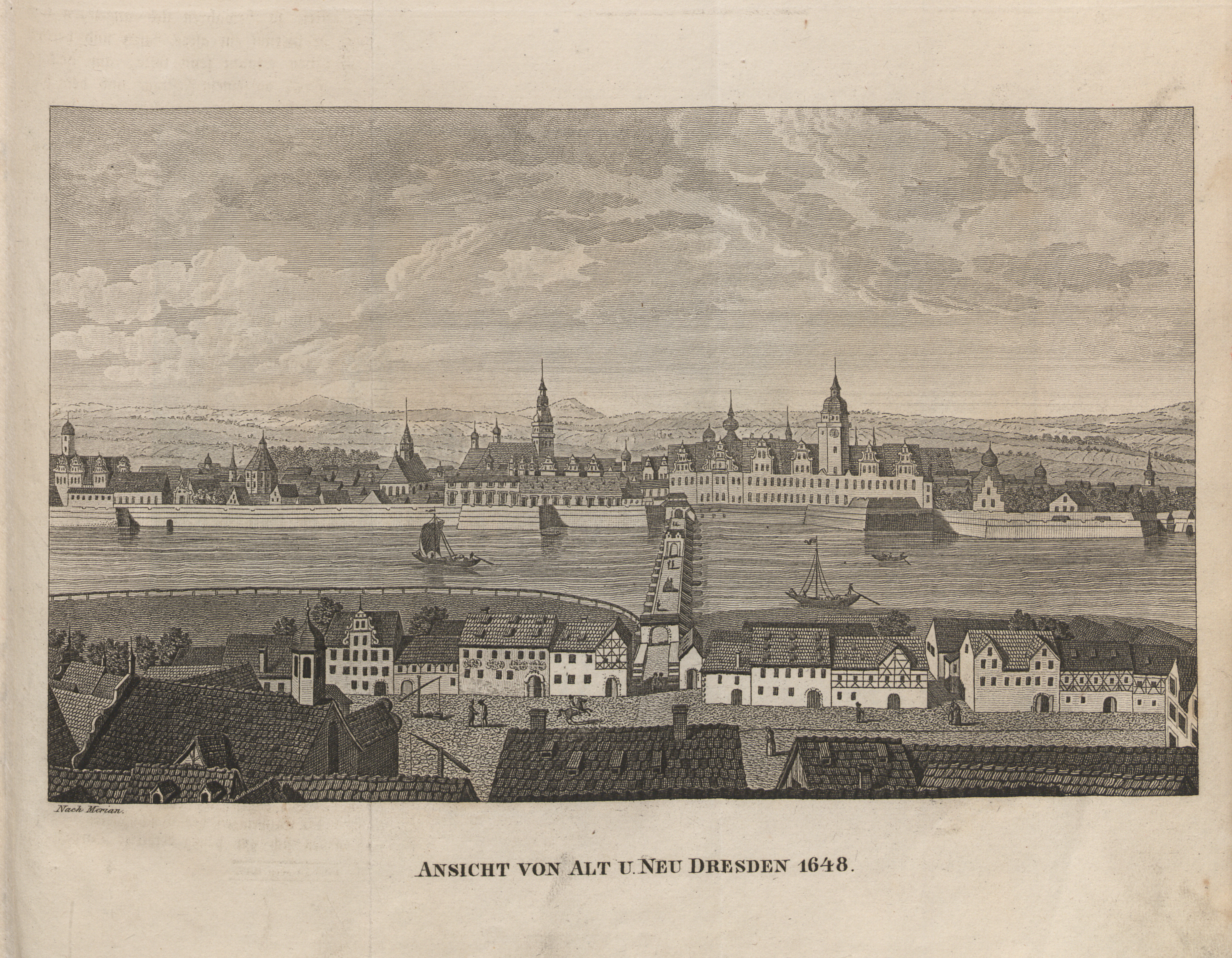 siehe Bildbeschreibung aus: Abbildungen von Dresdens alten und neuen Pracht-Gebäuden, Volks- und Hof-Festen. Untertitel: Kupferheft zur Chronik der Kgl. Sächs. Residenz-Stadt Dresden und des Sammlers für Geschichte und Alterthum, Kunst und Natur im Elbthale. Grimmer, Dresden 1835